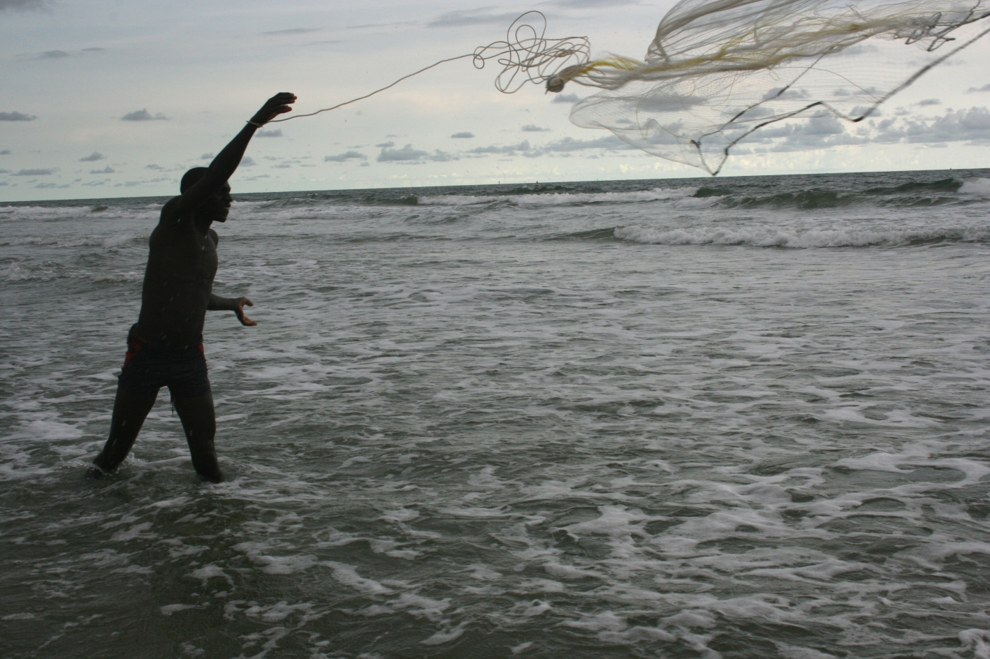 Un Diola pratiquant la pêche au filet en bord de mer à Boucotte (Casamance, Sénégal)